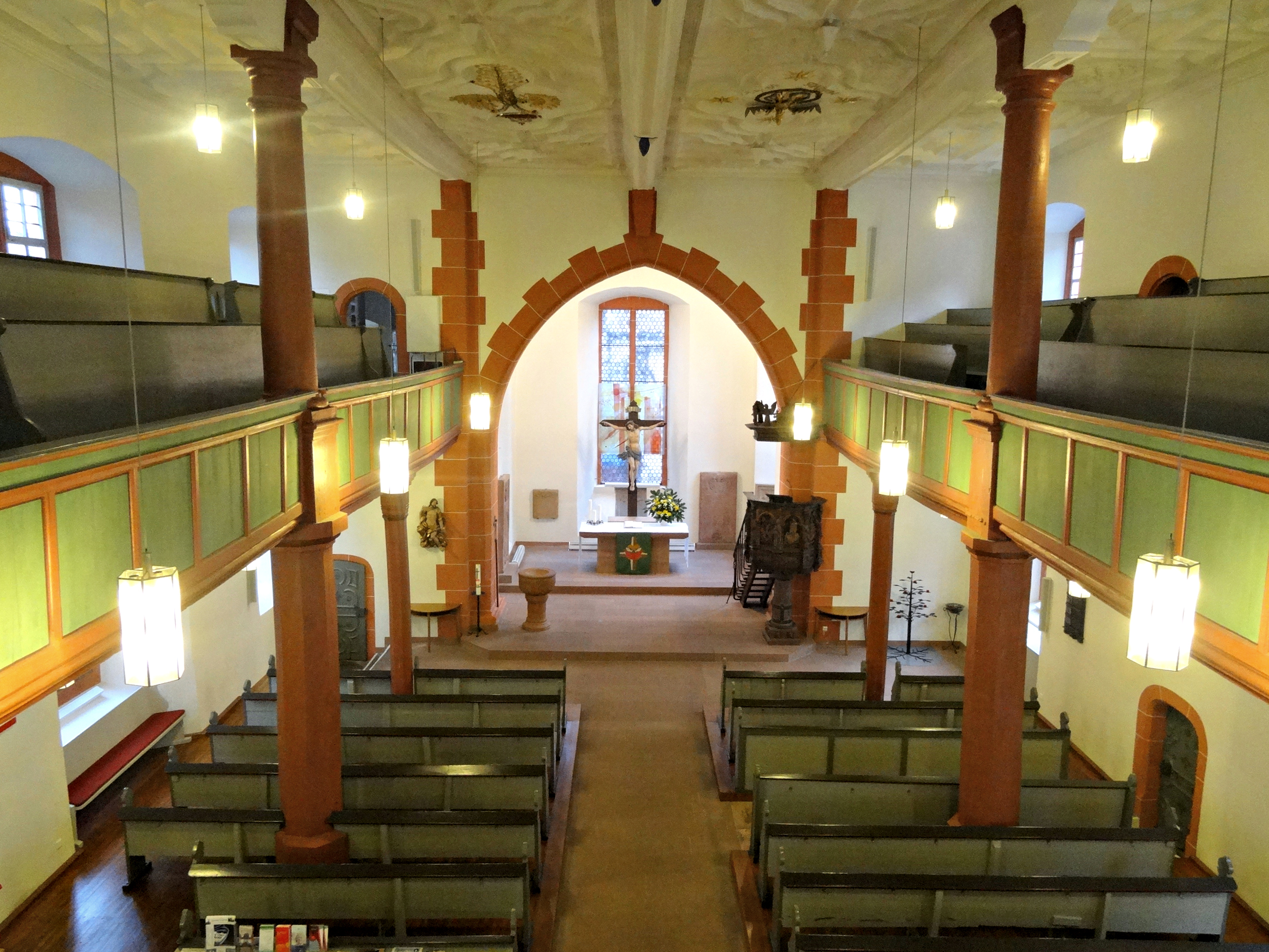 Stadtkirche zum Heiligen Geist (Nidda)